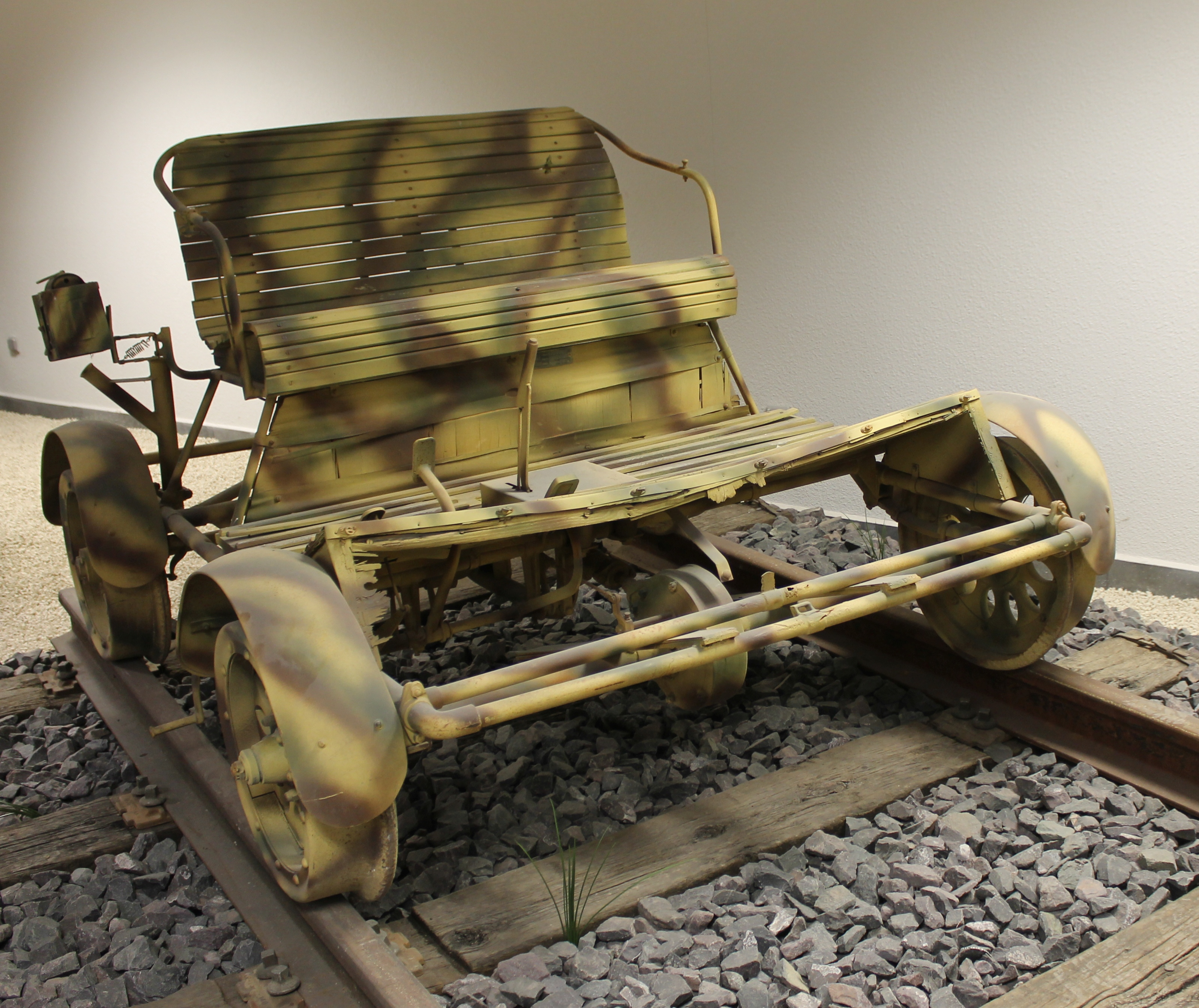 MM Parc France, Eisenbahn-Draisine